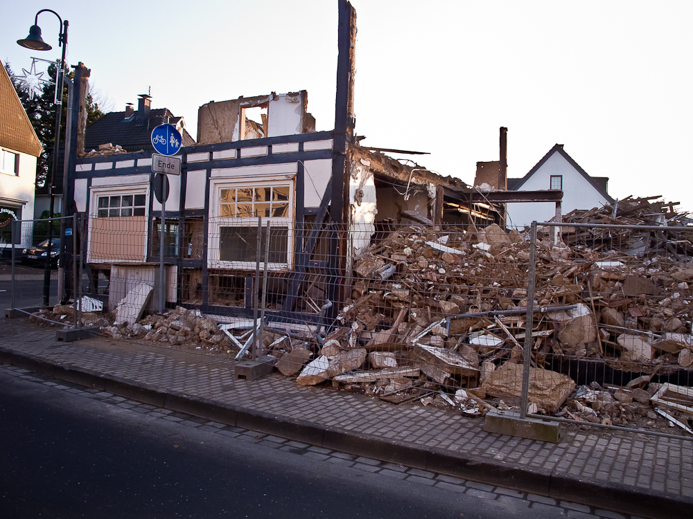 Rösrath, Denkmalnummer 37, Bensberger Strasse 287 - Abrisszustand am 29. November 2011: Das zerstörte Denkmal